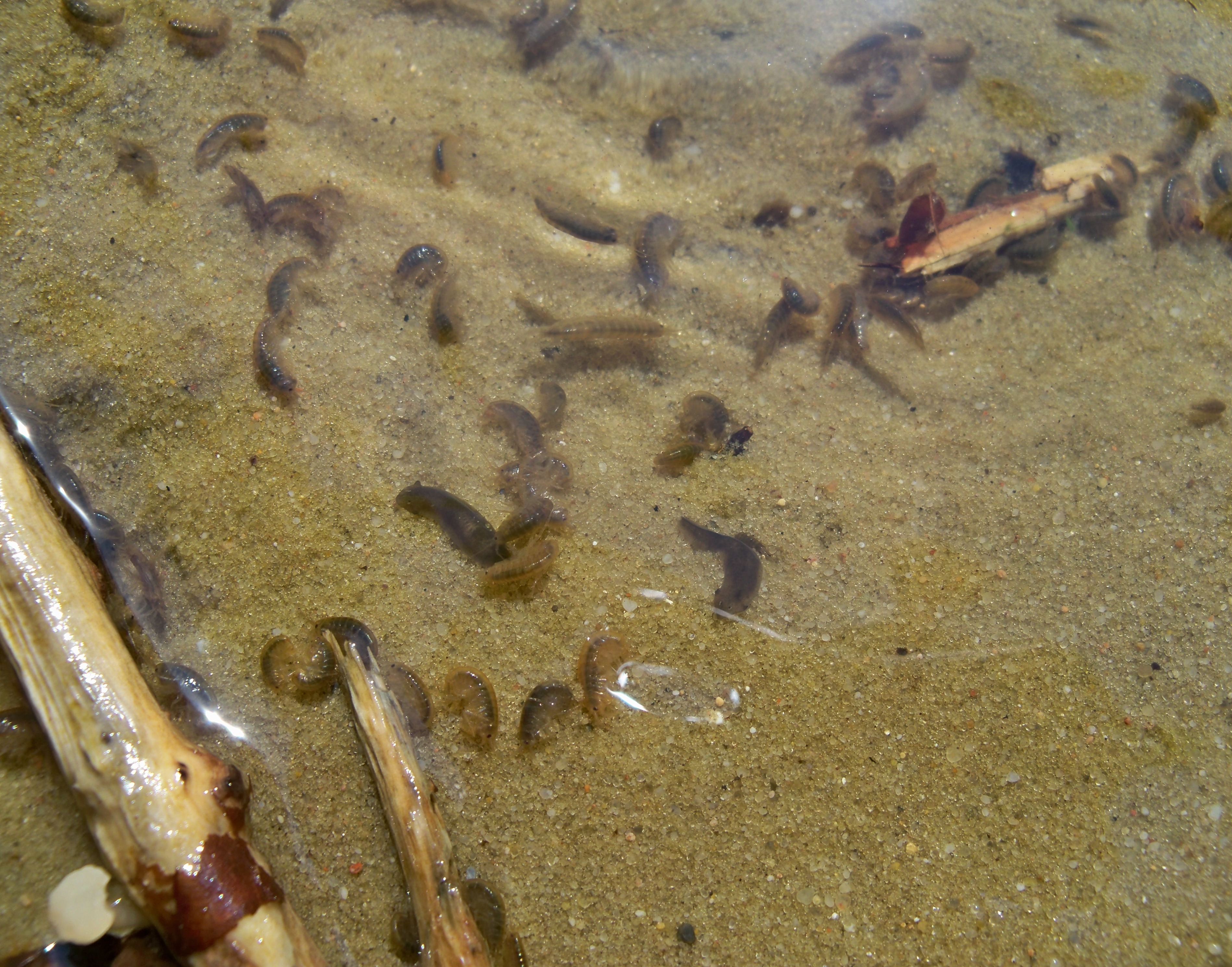 Ogrodzieniec – pomnik przyrody Źródła Centurii. Kiełże i wypławki.